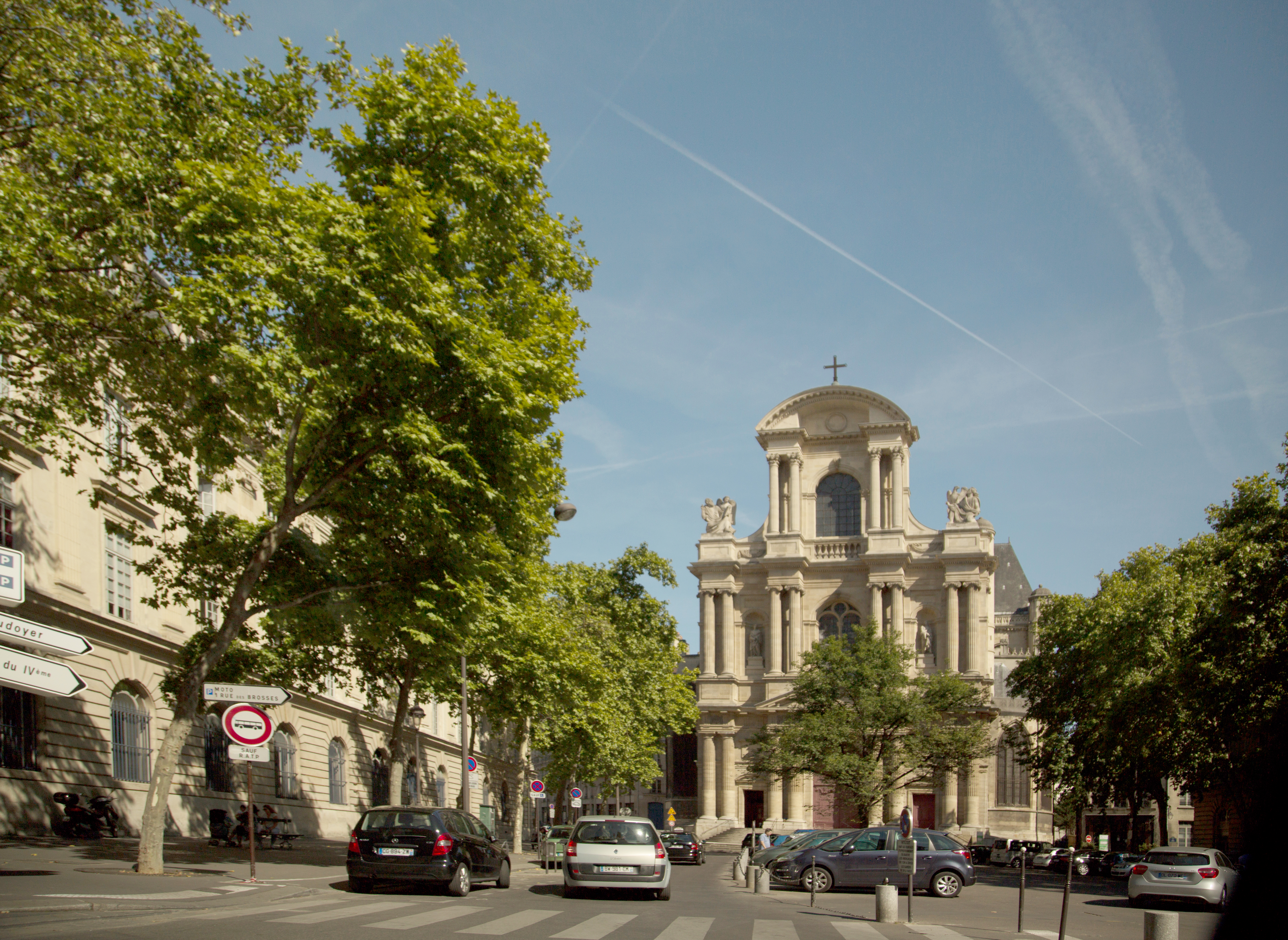 Église Saint-Gervais-Saint-Protais, Paris, France.